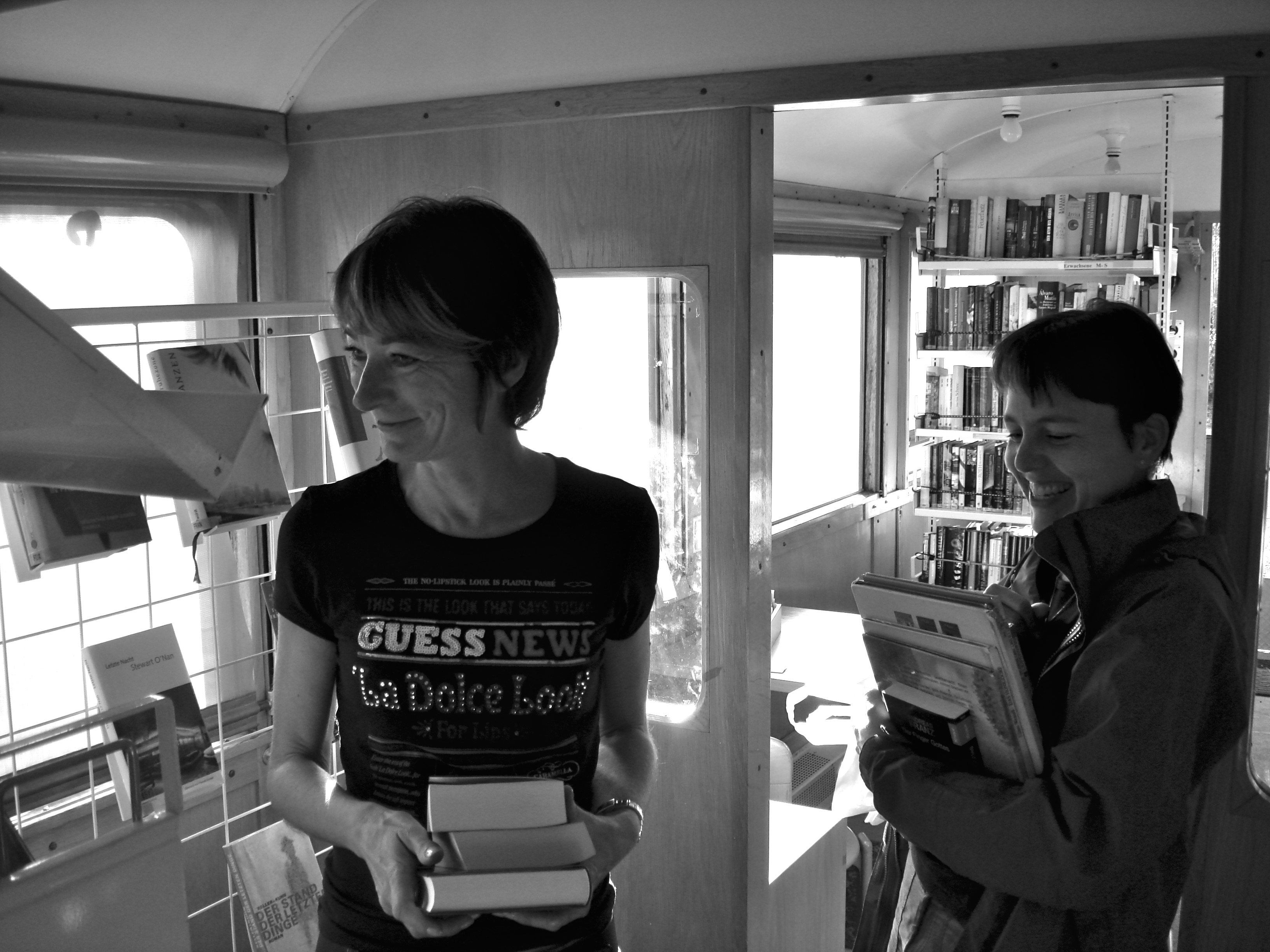 Ausleihe in der Bibliobahn (links im Bild: Lydie Looser, Mitarbeiterin in Bühler)